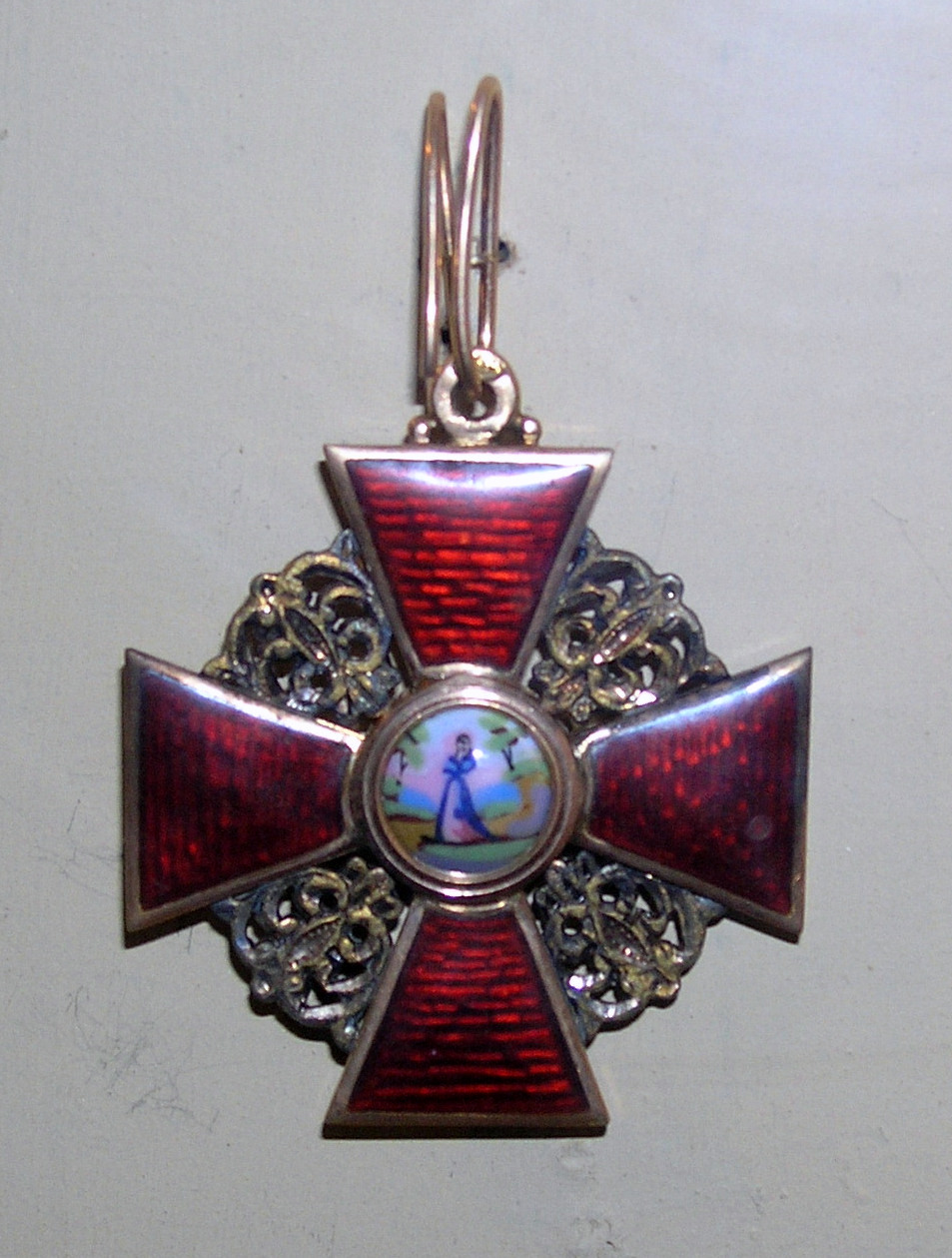 Крест ордена Святой Анны. Тольяттинский краеведческий музей. Стенд, посвящённый врачу Алексею Рапидову